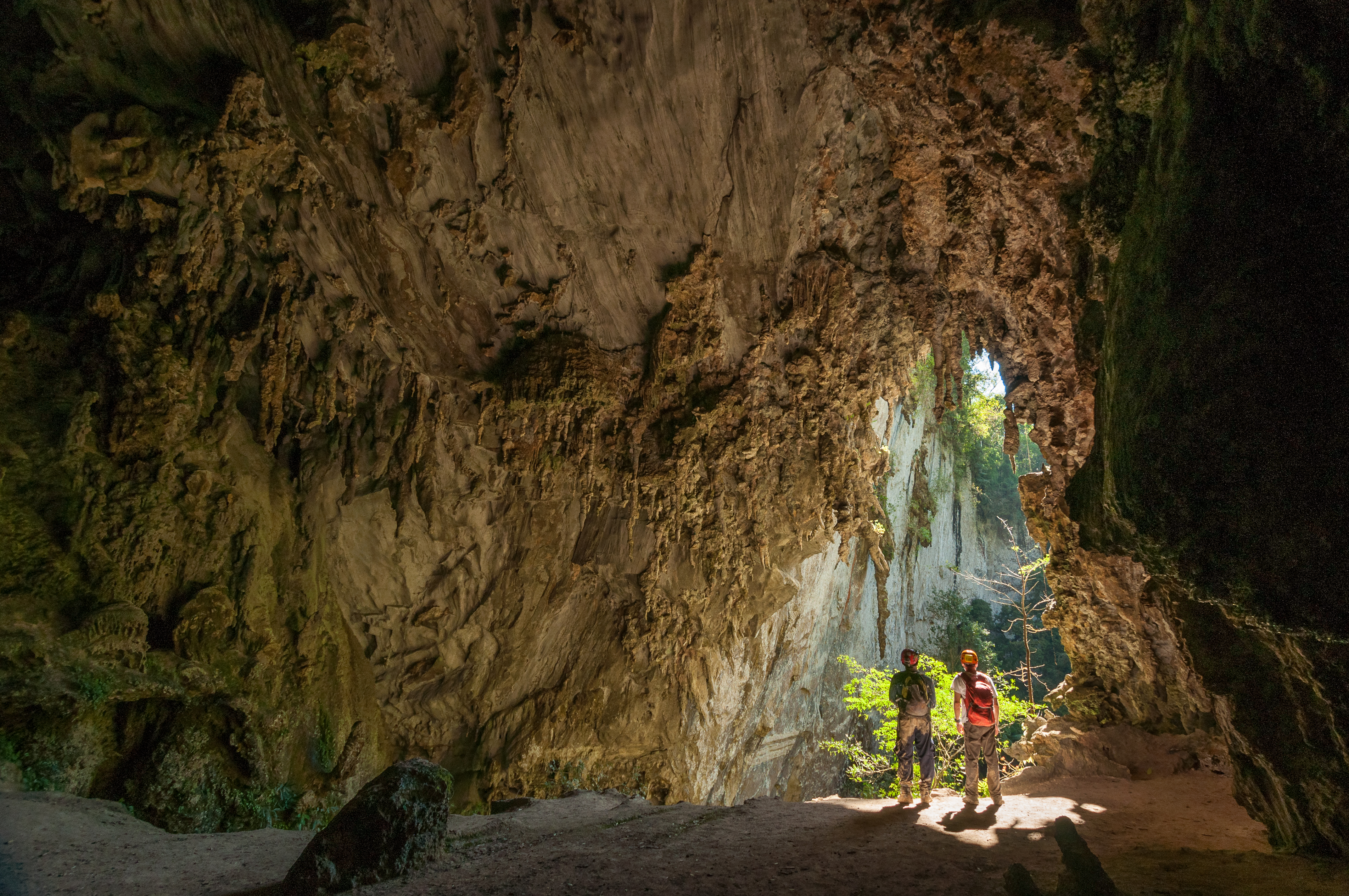 Caverna Timimina, PETAR - Núcleo Caboclos